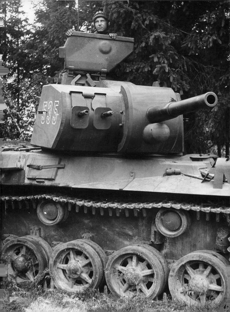 Pansarvapnets nya 22 tons stridsvagnar fotograferade för första gången.Den nya stridsvagnen, som numera finnes vid våra pansarregementen är av modell 1942 och mer än dubbelt så tung som våra tidigare stridsvagnar. Den är utrustad med en 75 mm kanon och tre kulsprutor. Bilden är tagen vid de nyligen avslutade stridsvagnsövningarna.